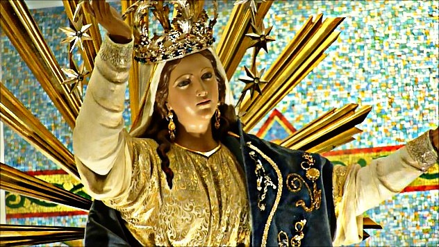 foto del venerato simulacro di Maria Santissima Assunta Nizza di Sicilia